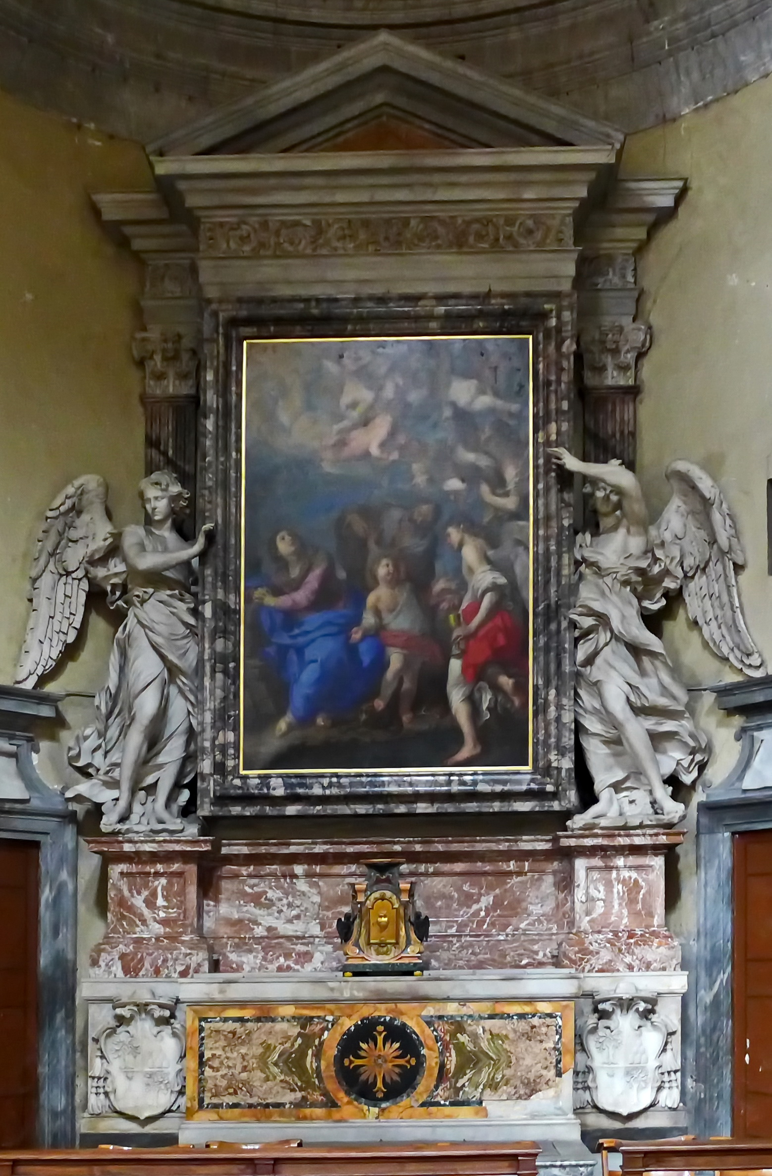 Rom - Basilika Santa Maria del Popolo